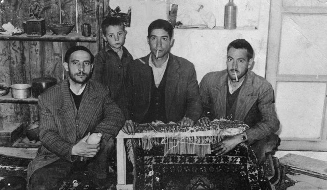 استاد اصغر روفه‌گر حق در سال 1335